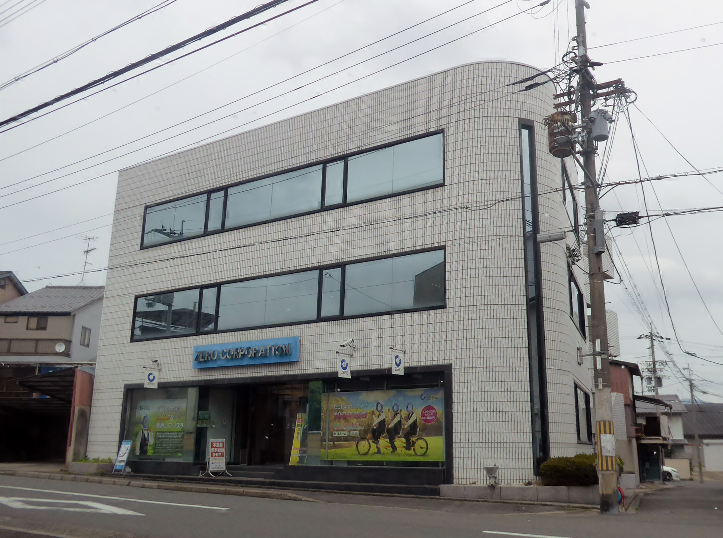 株式会社ゼロ・コーポレーション本社を撮影。